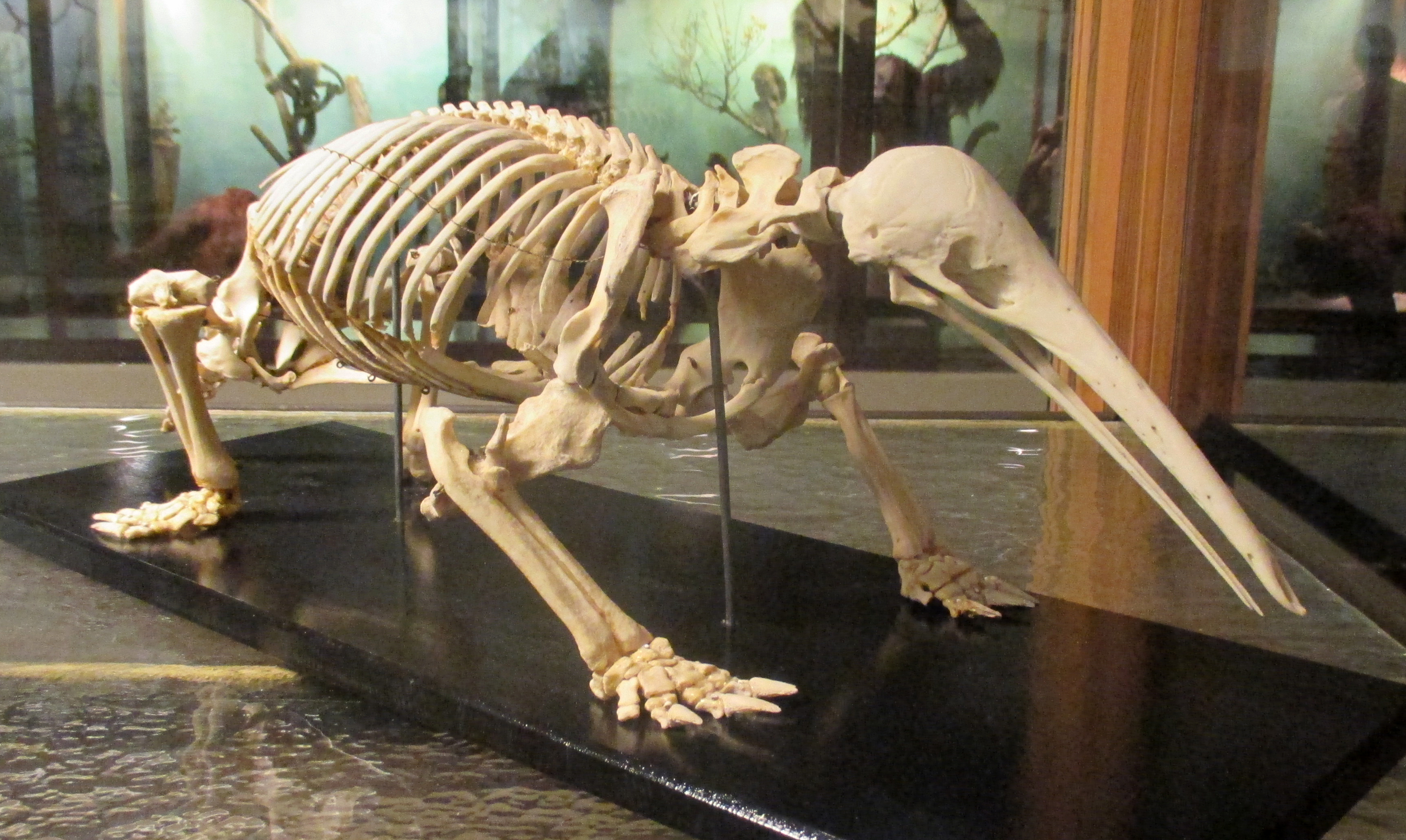 Skelettet av ett långnäbbigt myrpiggsvin av arten Zaglossus bruijni på Göteborgs Naturhistoriska Museum, Göteborg, Sverige.